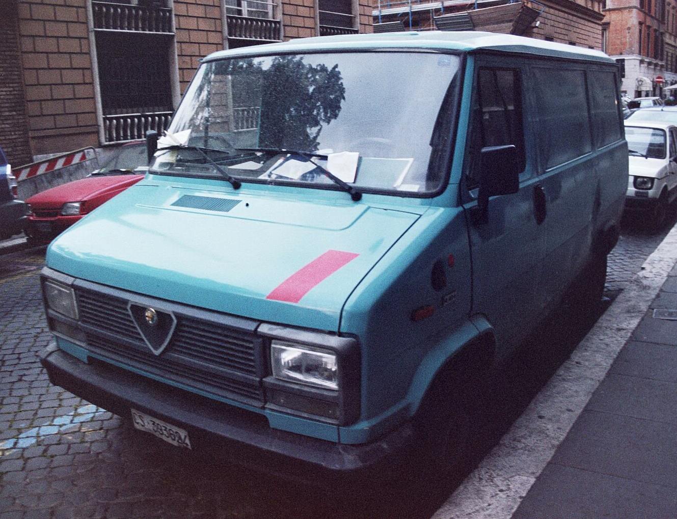 Alfa Romeo AR6.14 in Rome 2001.